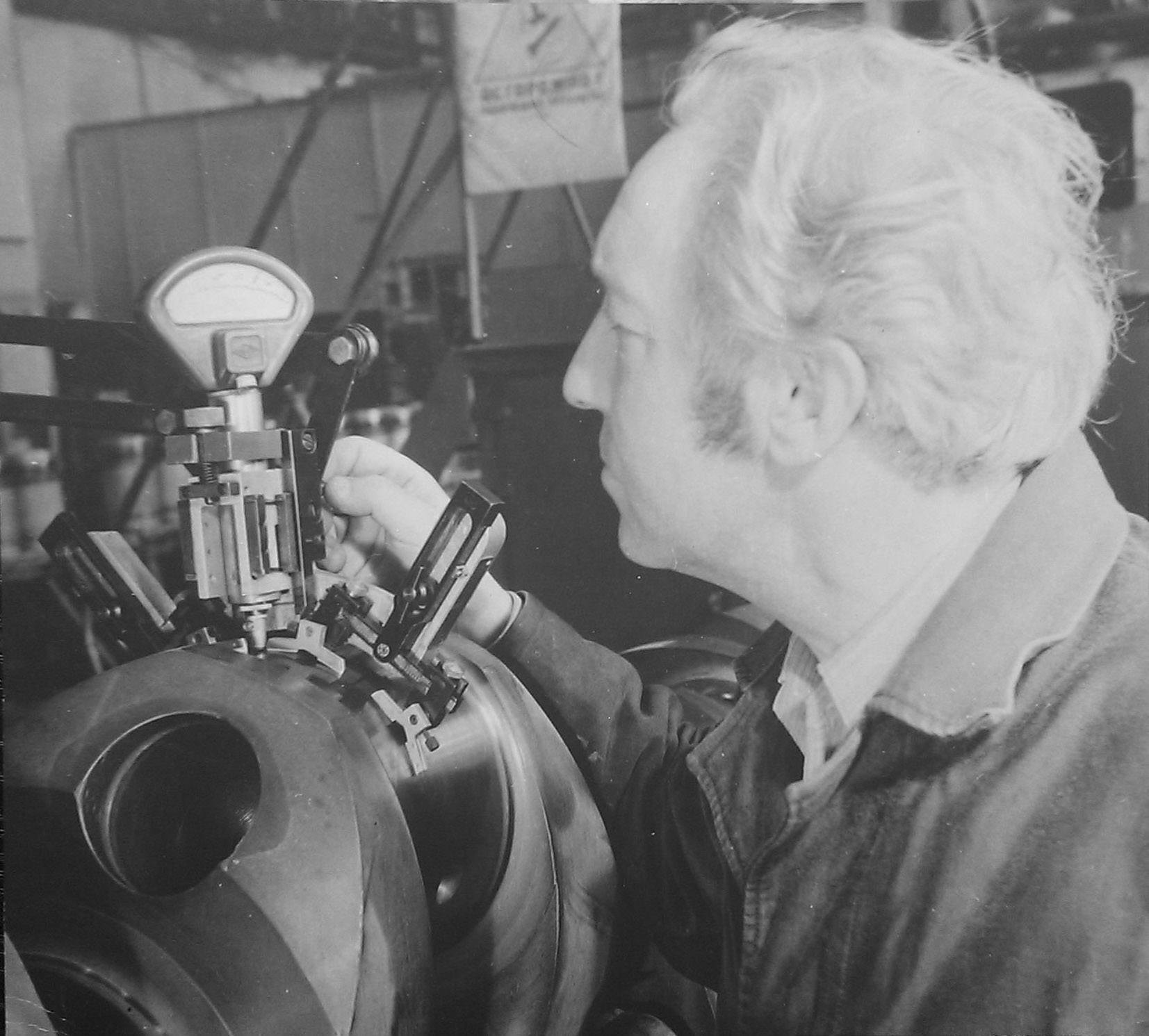 Измерение отклонения от круглости шатунной шейки коленвала